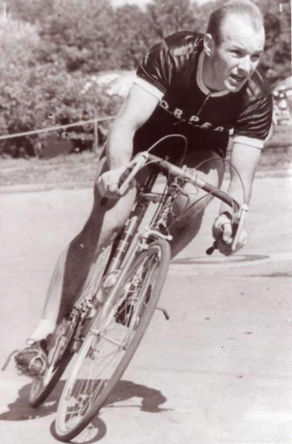 Dieter Kemper 1961 als Profi-Neuling in Aktion